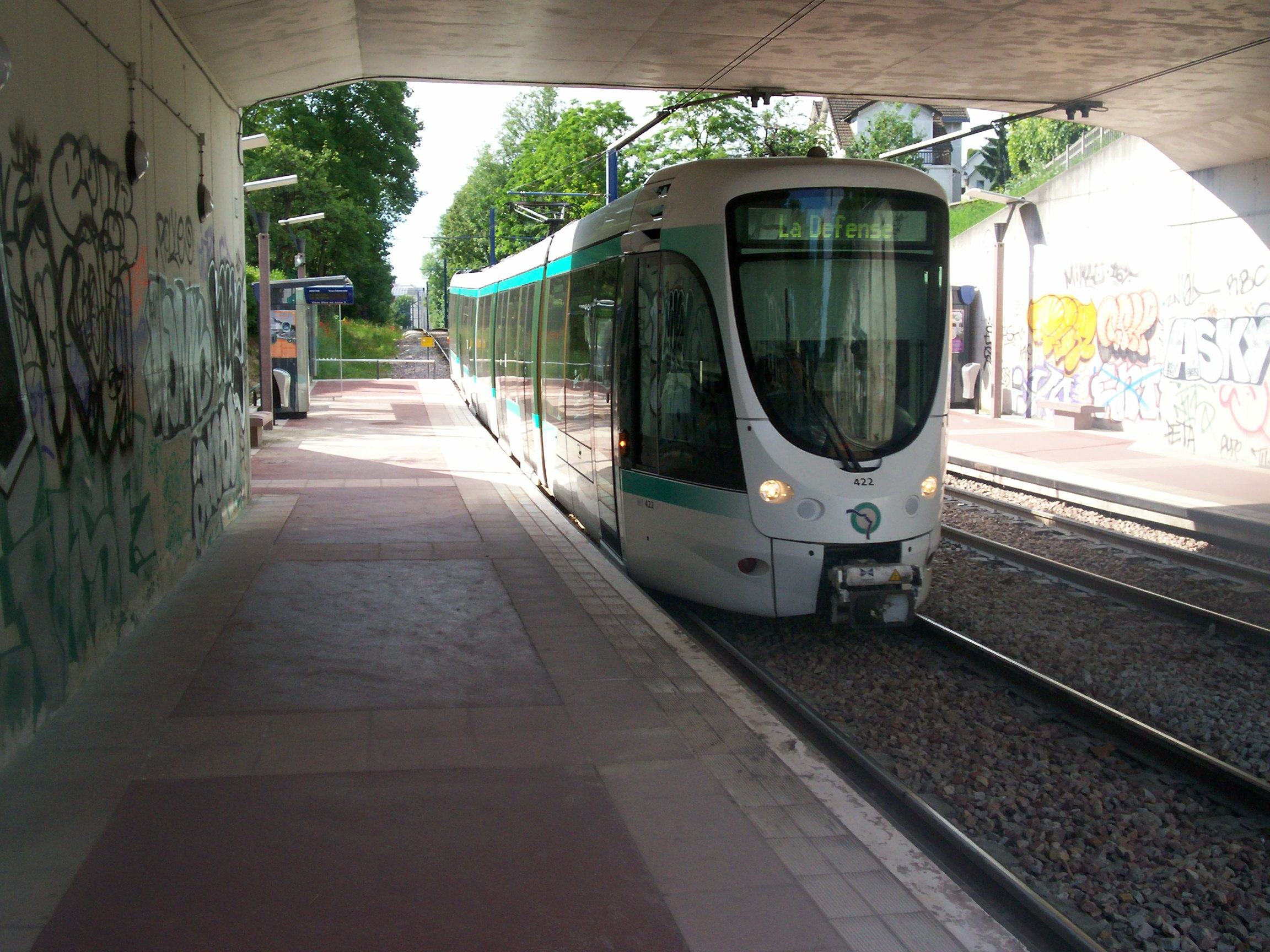 Paris Tramway ligne 2